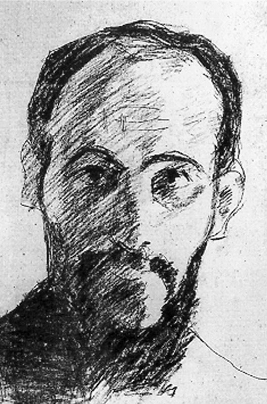 Dessin